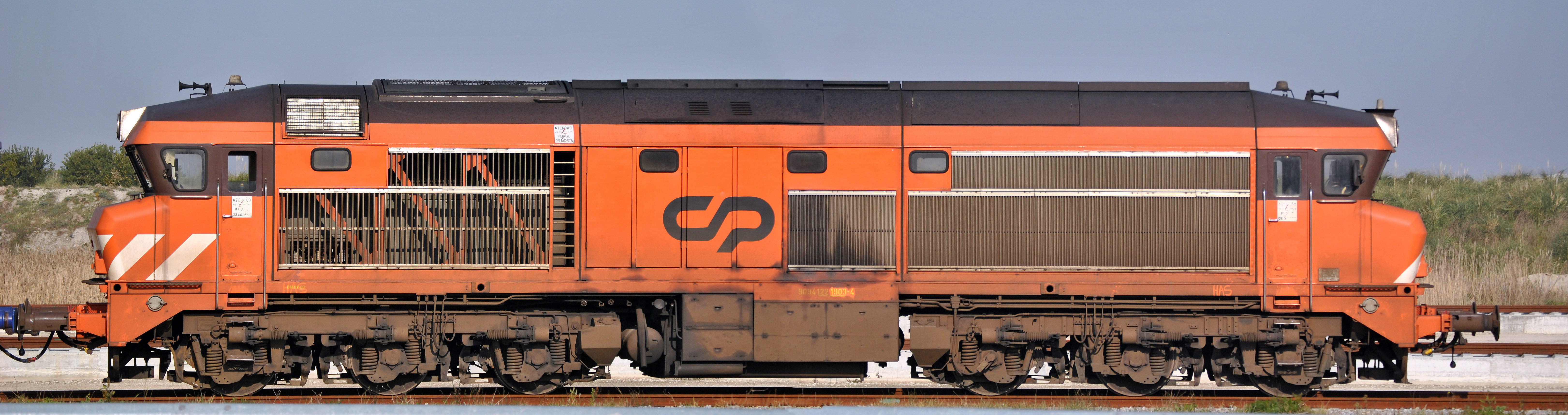 Grande Perfil da CP 1903